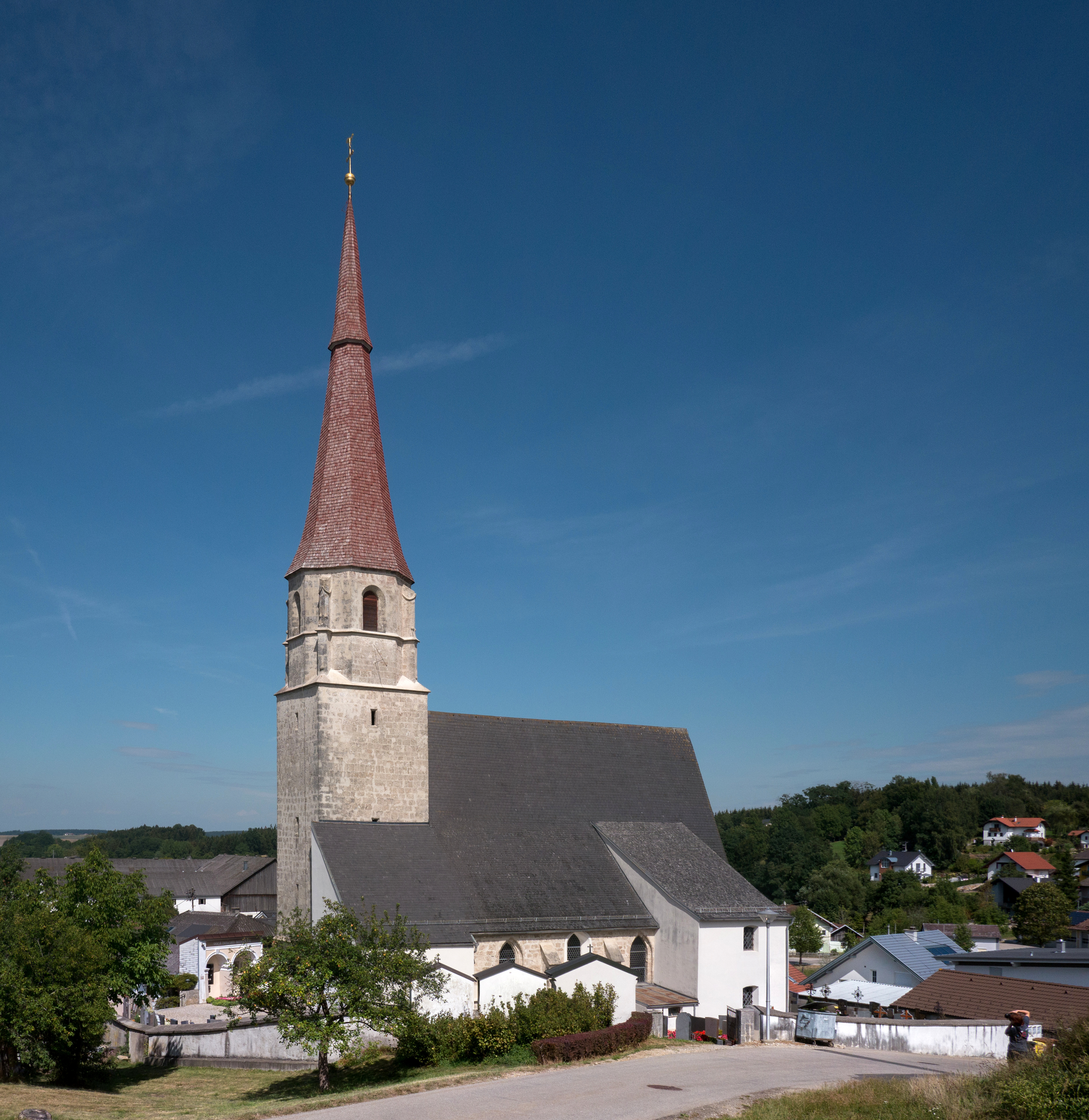 Kath. Pfarrkirche hl. Jakob der Ältere und Friedhof